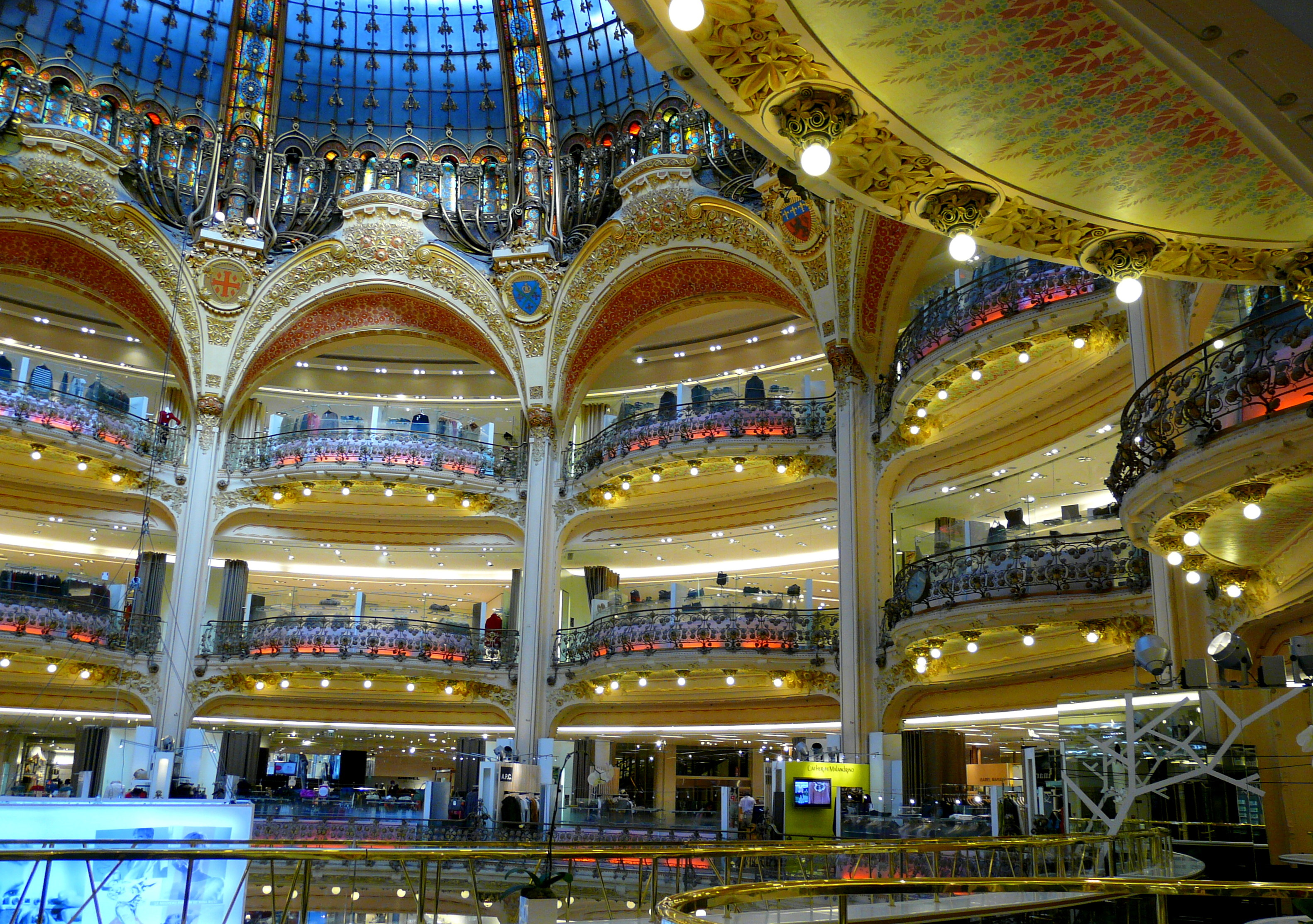 Art Nouveau aux Galeries Lafayette Hausmann à Paris